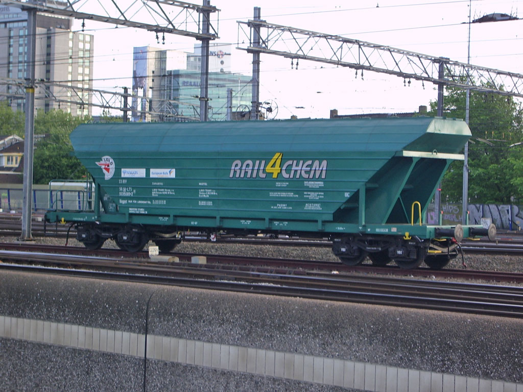 Goederenwagon van Rail4Chem te Utrecht Centraal, mei 2006.